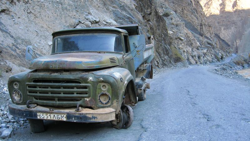 Abandoned ZiL-130 truck near Ayni, Tajikistan.